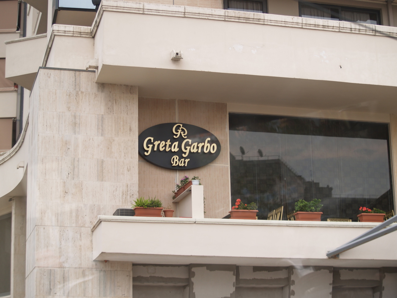 Greta Garbo bar Tirana Albania